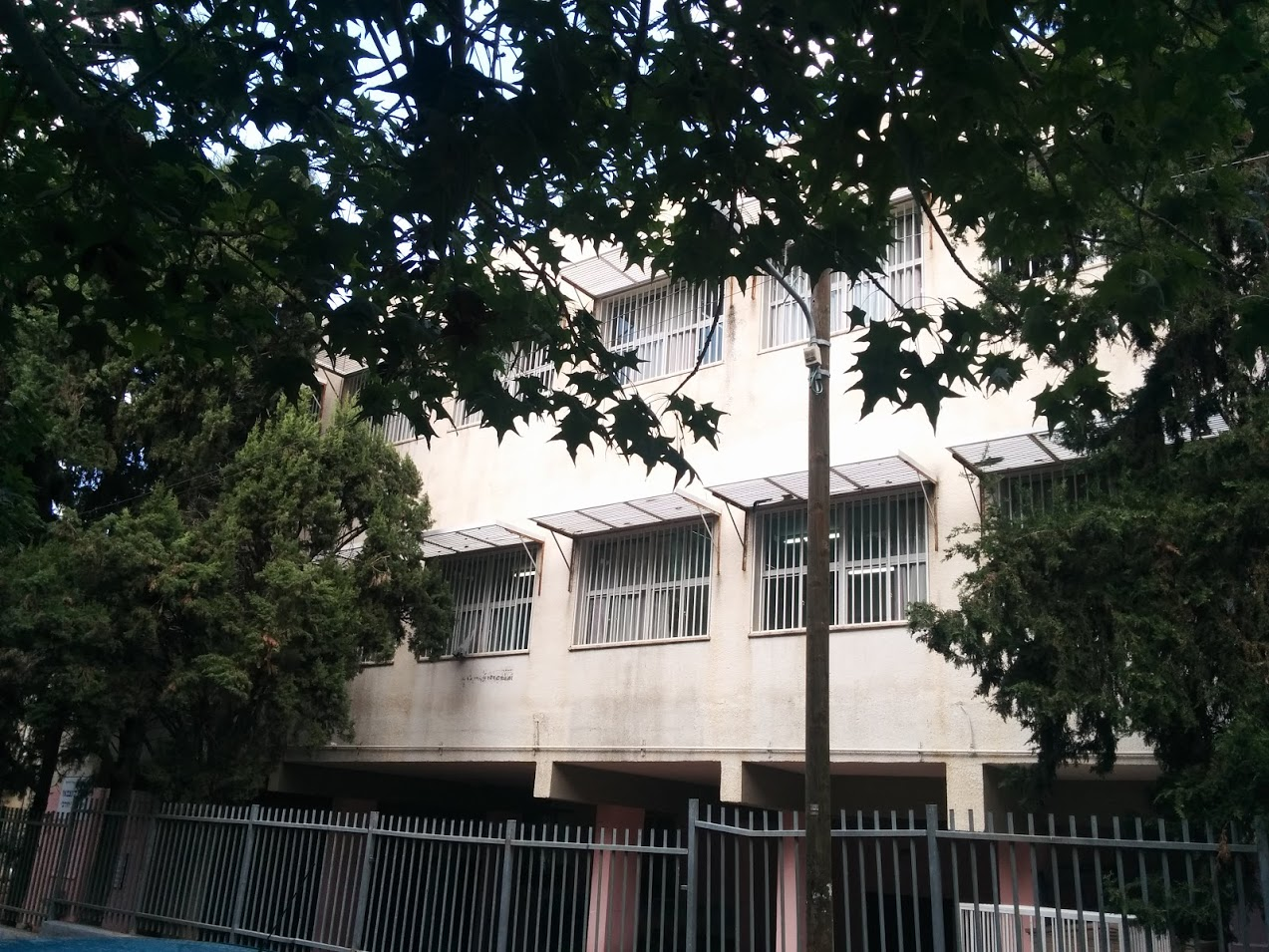 תמונה של בית ספר חורב שברמת גן